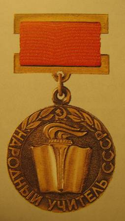 Знак «Народный учитель СССР»